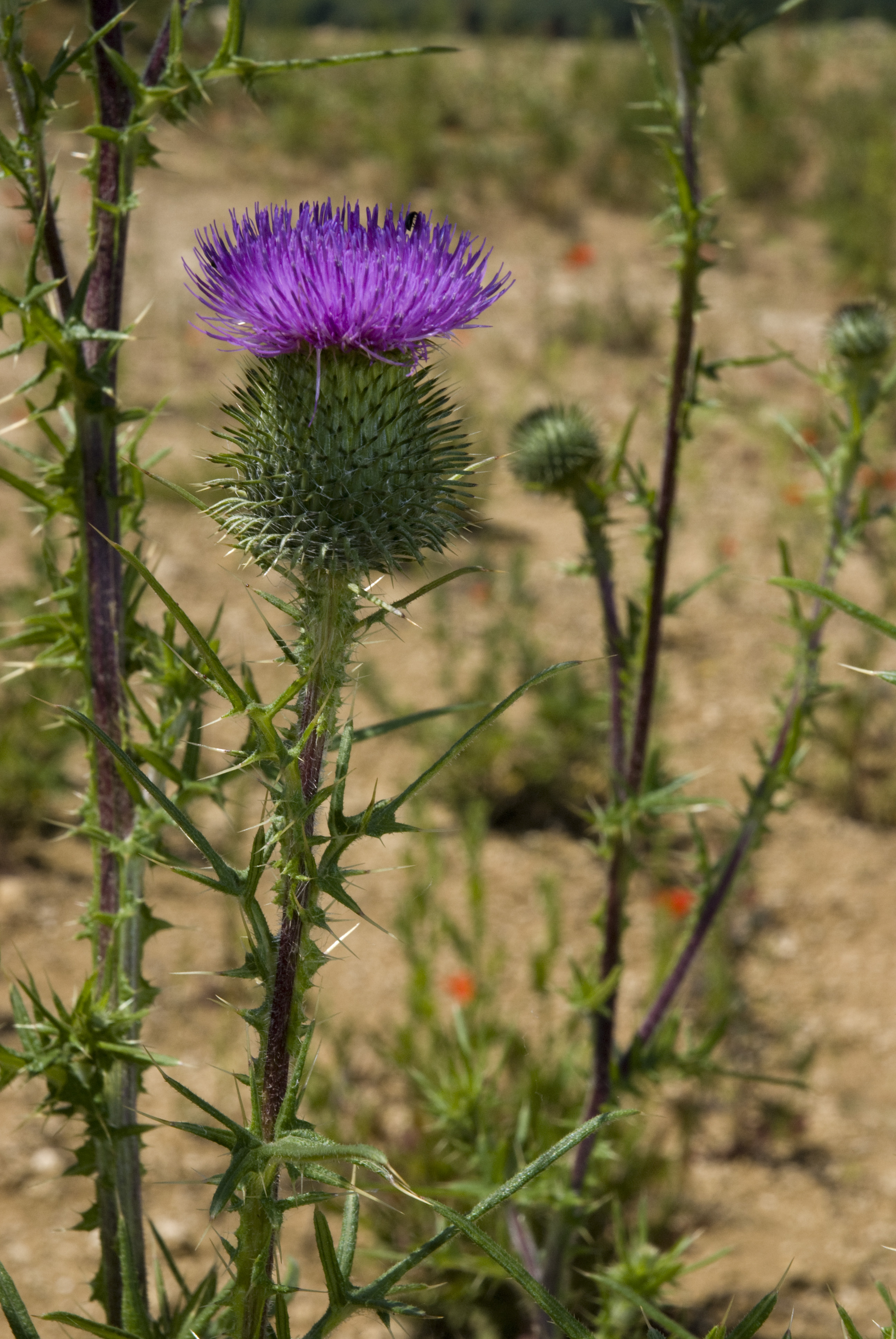 Cirsium vulgare Carrière de Fossoy (Aisne), France